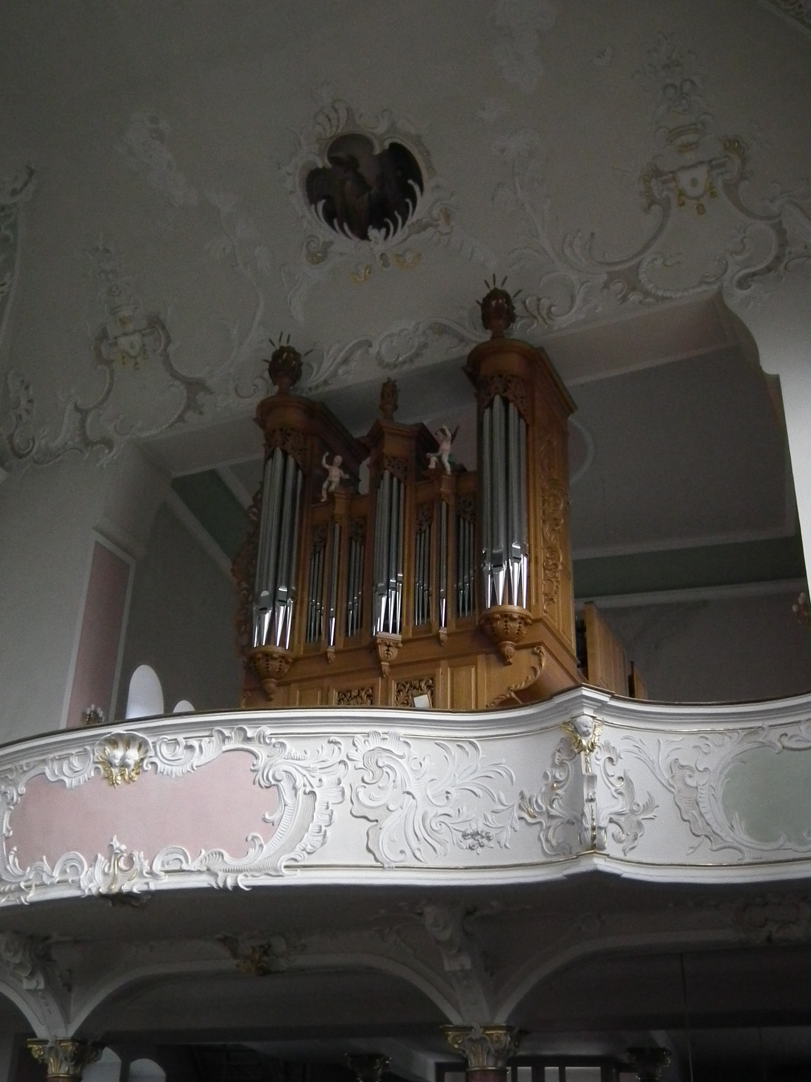 Statue des Heiligen Laurentius in der gleichnamigen Kirche in Wiesloch (Baden-Württemberg, Deutschland)